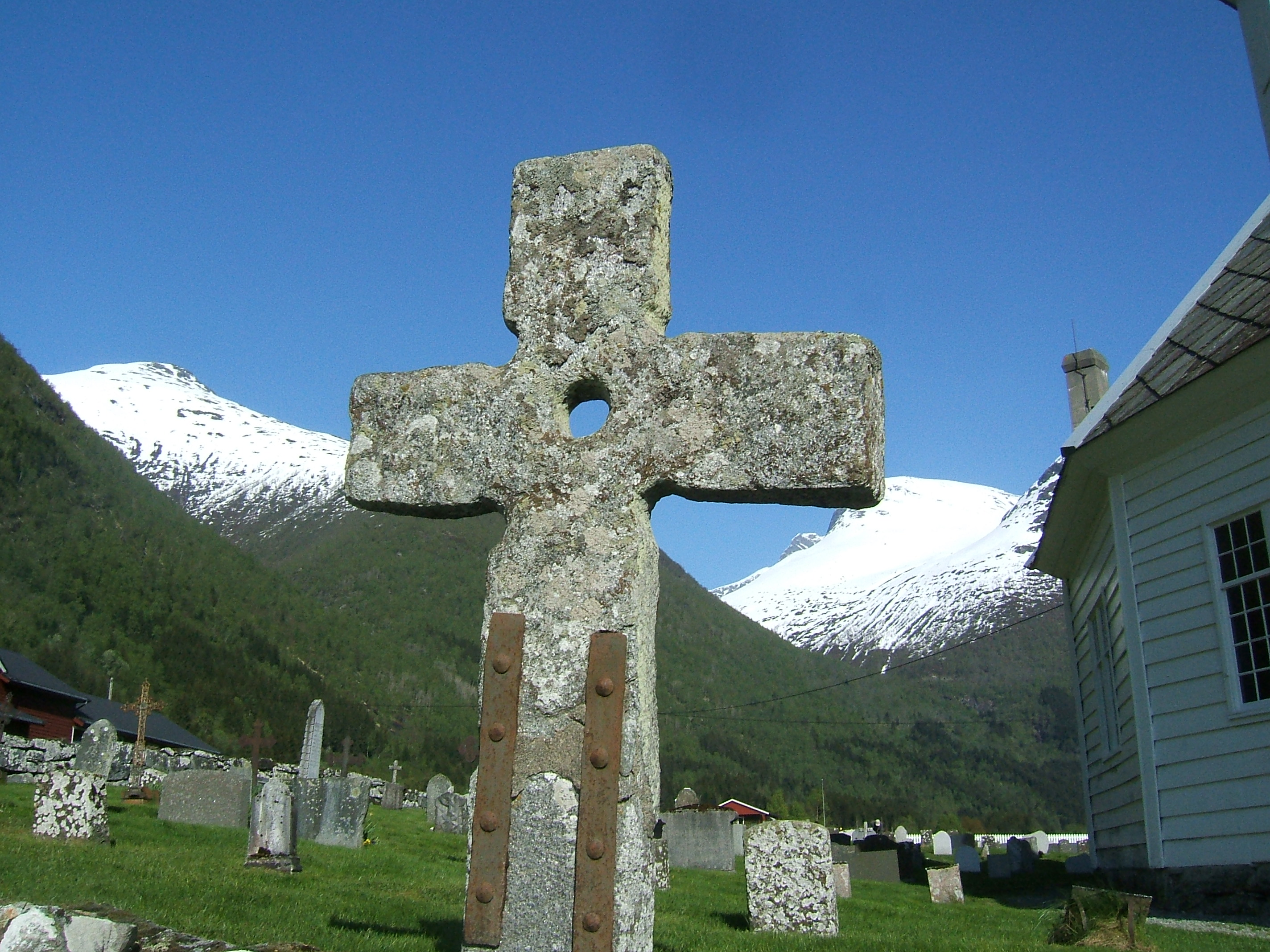 Steinkrossen på kyrkjegarden i Loen i Stryn